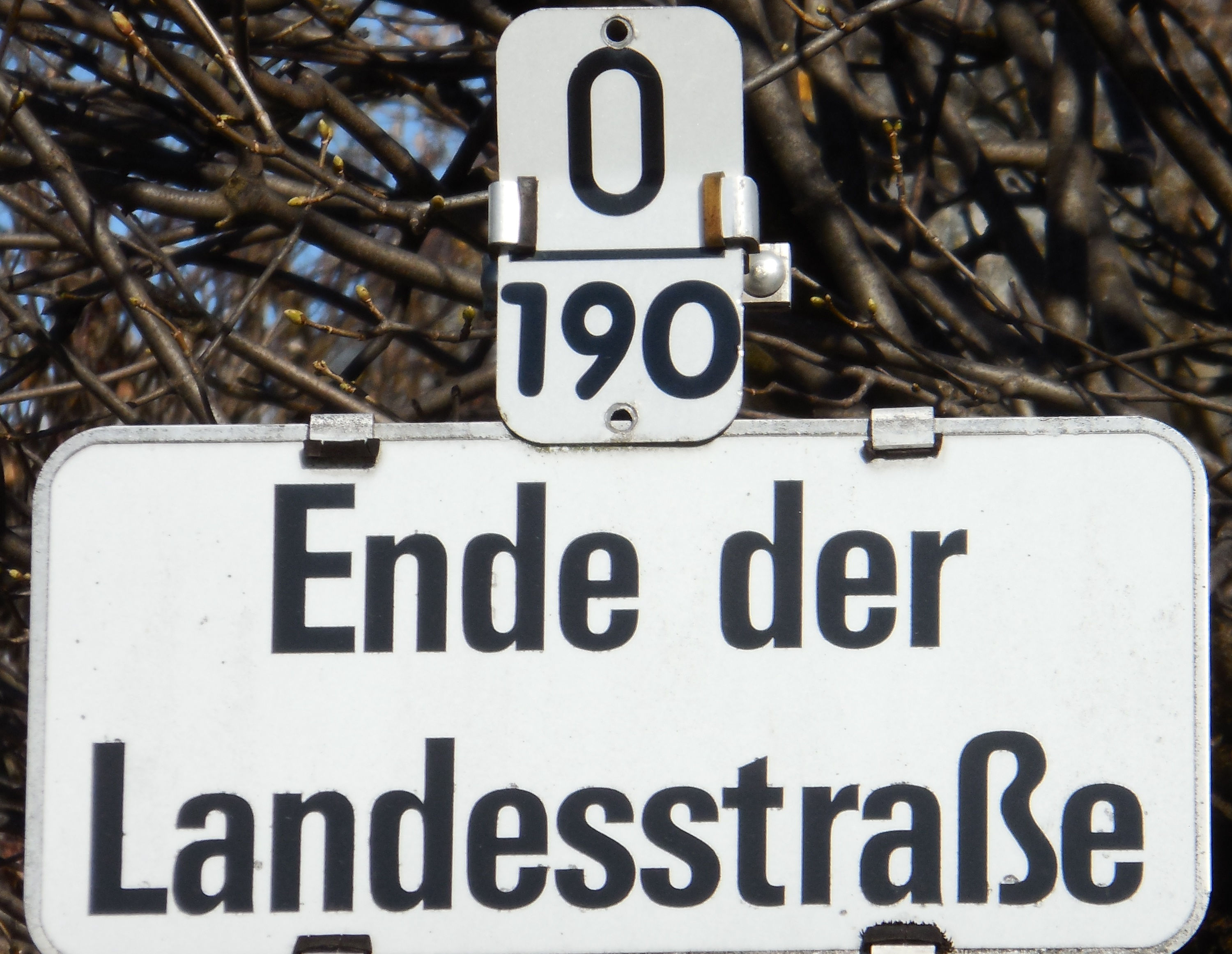 Ende der L 258 in Maria Alm am Steinernen Meer